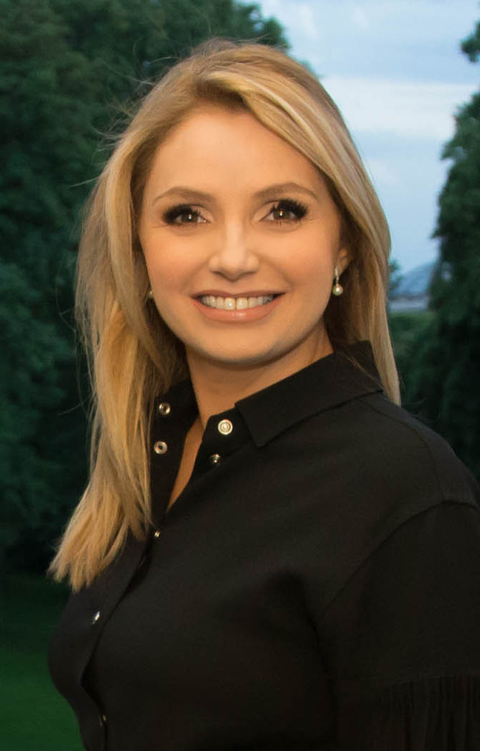 El Presidente Enrique Peña Nieto se encuentra en París, en donde se reunirá con el Presidente Emmanuel Macron, con el objetivo de fortalecer la relación entre México y Francia.